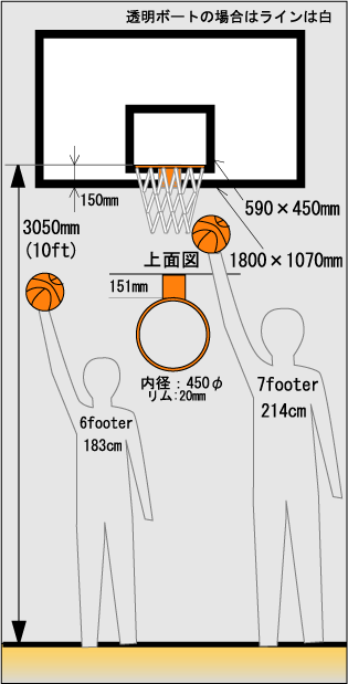 FIBA バスケットゴール Adobe Illustrator 9.0J